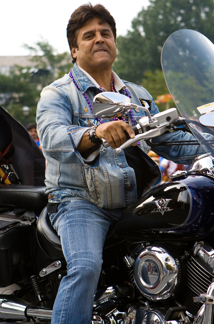 Erik Estrada at DragonCon '07 in Atlanta, GA